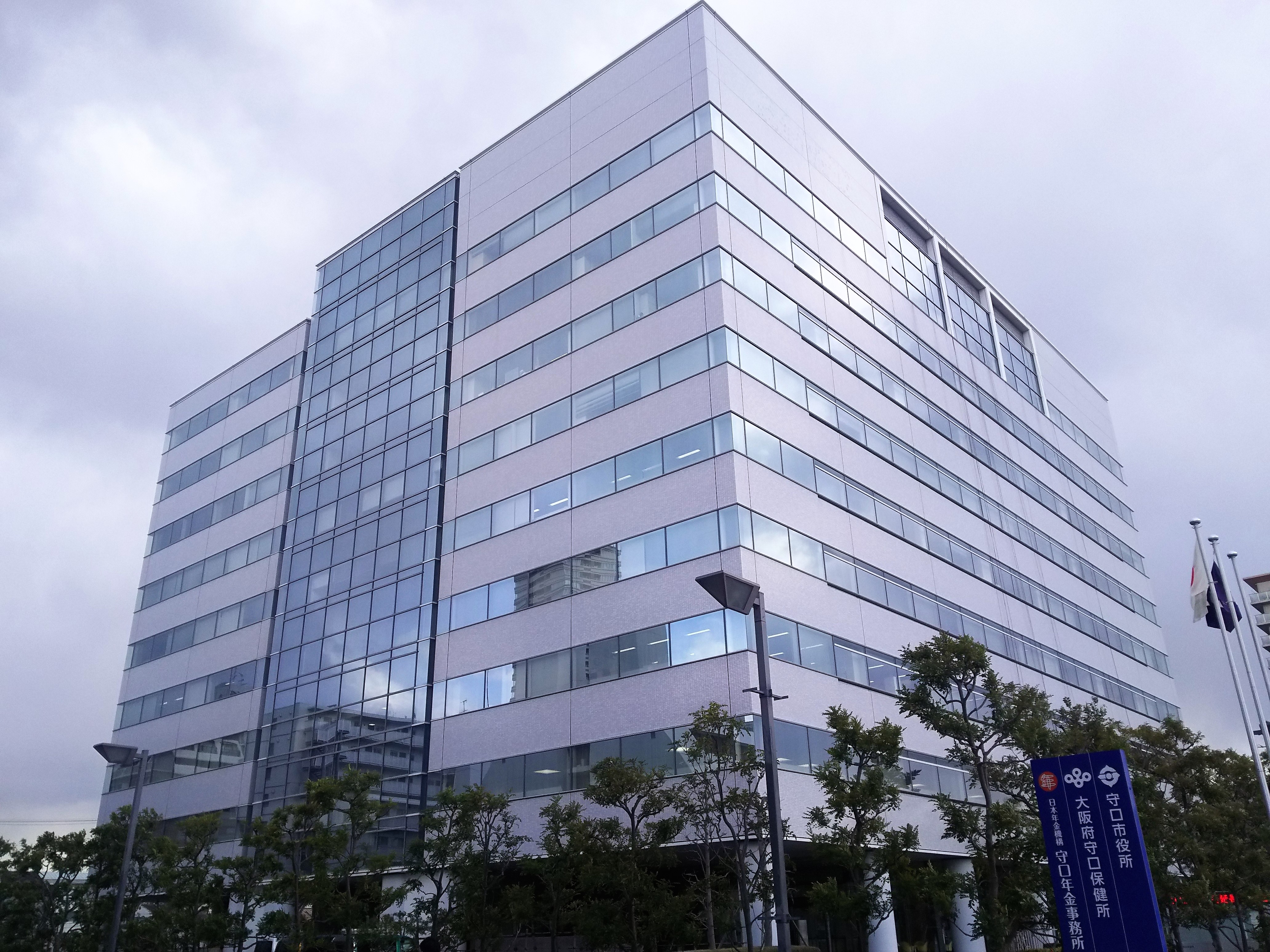 守口市役所新庁舎（大阪府守口市）